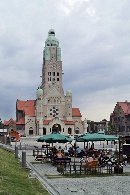 Zespół kościoła parafialnego pw. św. Pawła: kościół i plebania Ruda Śląska Nowy Bytom, Plac Wolności 5 (obecnie plac Jana Pawła II), Ruda Śląska